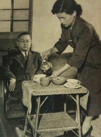 日高孝次・艶子夫妻